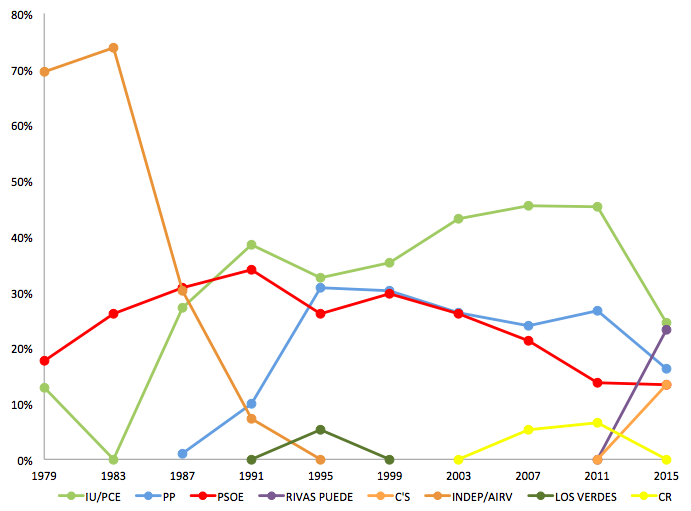 Resultados históricos en las elecciones municipales de Rivas-Vaciamadrid